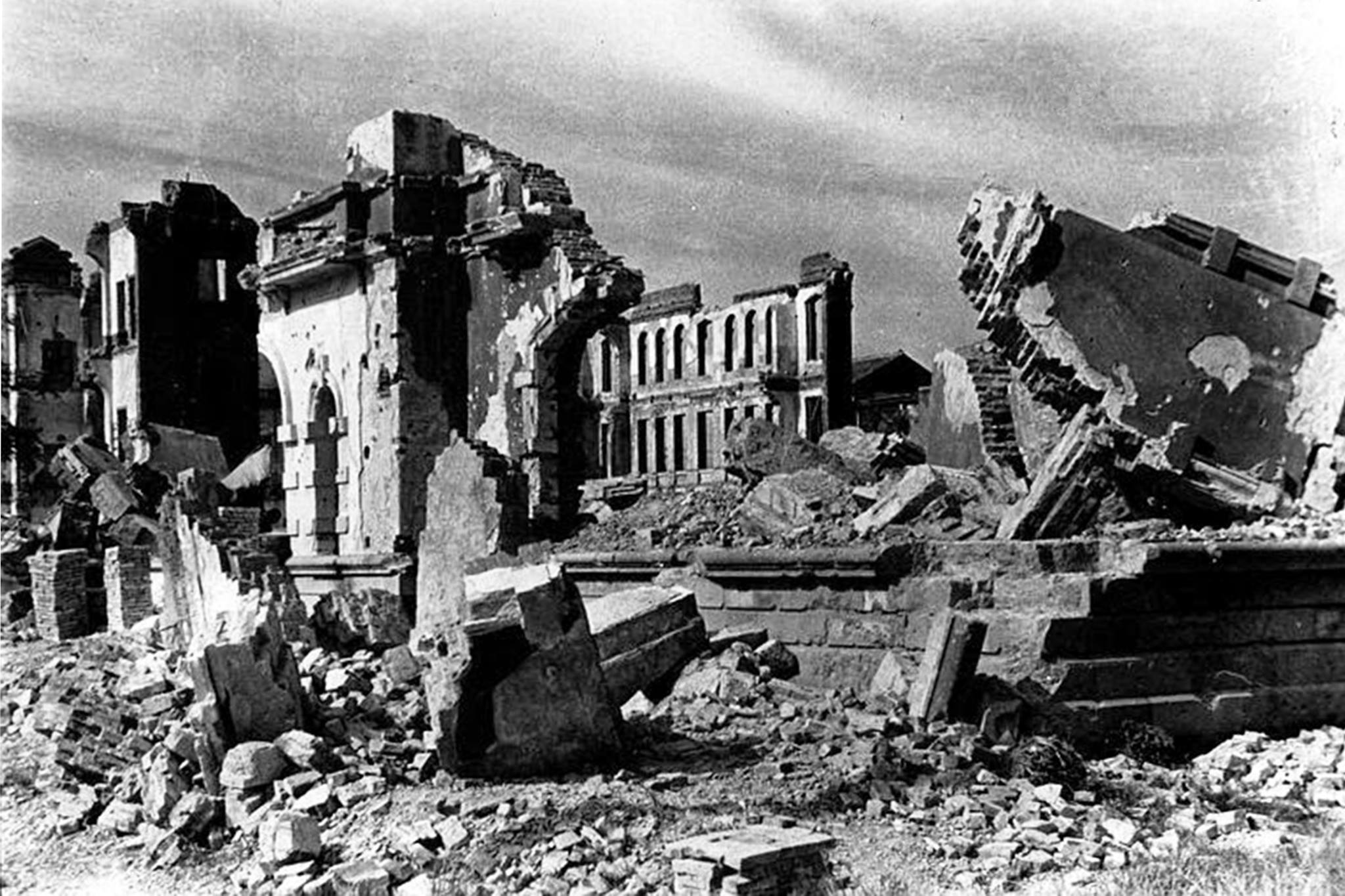 臺灣總督府圖書館（原彩票局，後改殖產局博物館，又在博物館遷至新公園後改變用途）建築物在轟炸後的殘跡。